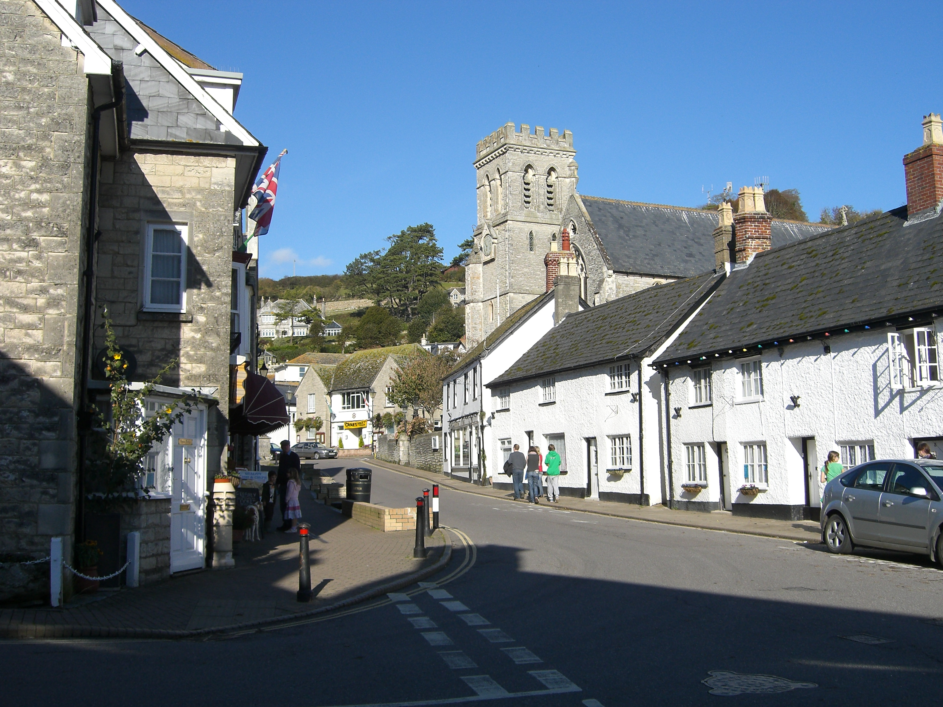 Beer